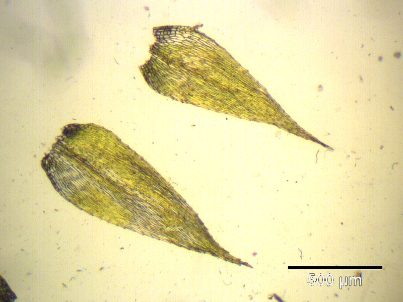 Samt-Kurzbüchsenmoos (Brachythecium velutinum), Blatt bei 40-facher Vergrößerung